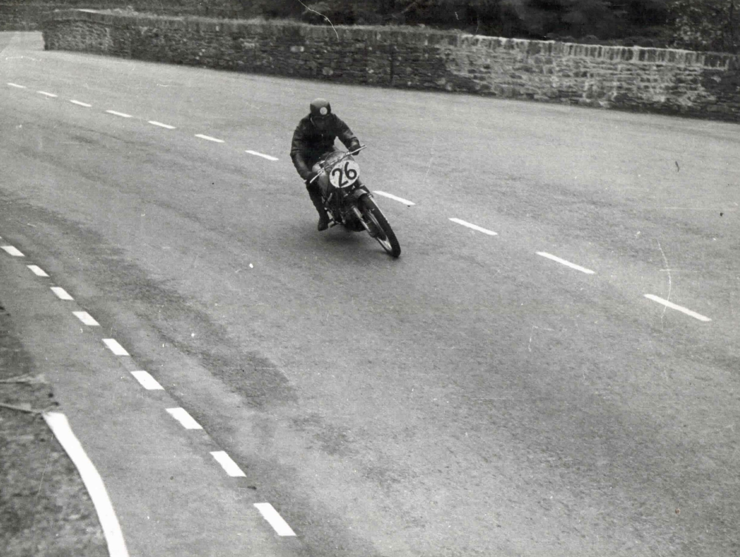 Omobono Tenni at the Tourist Trophy 1948 - Braddan Bridge - Last Lap